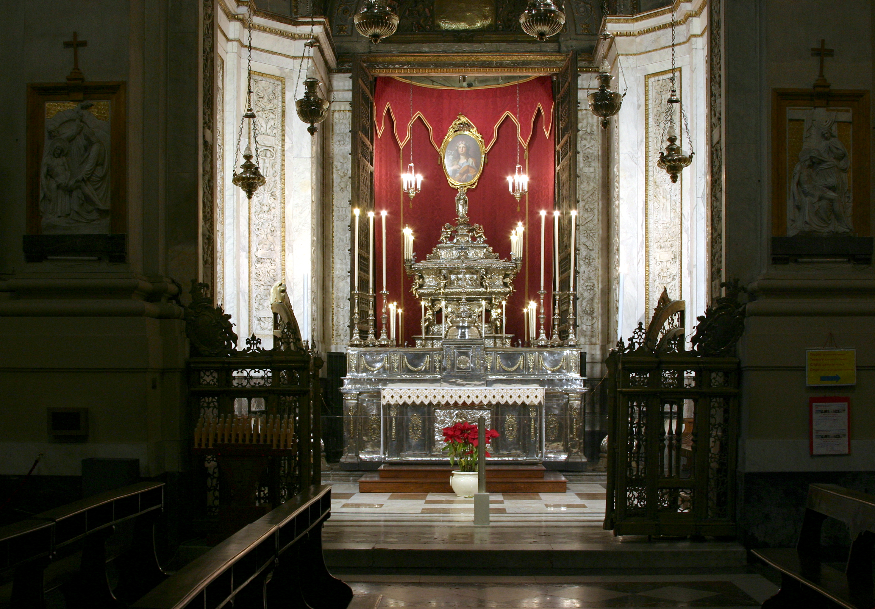 Cathedral of Palermo